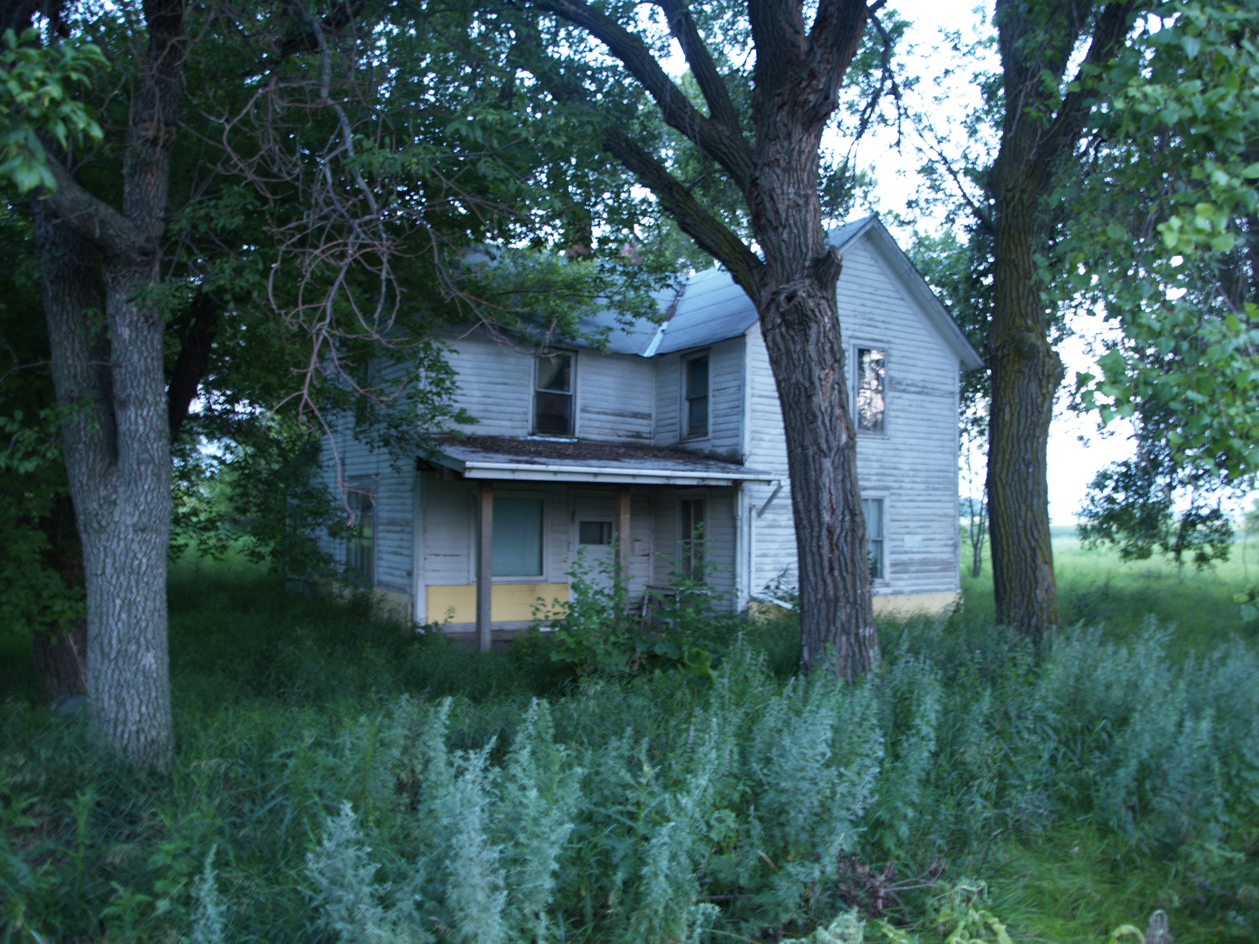 Bartlett, North Dakota. From